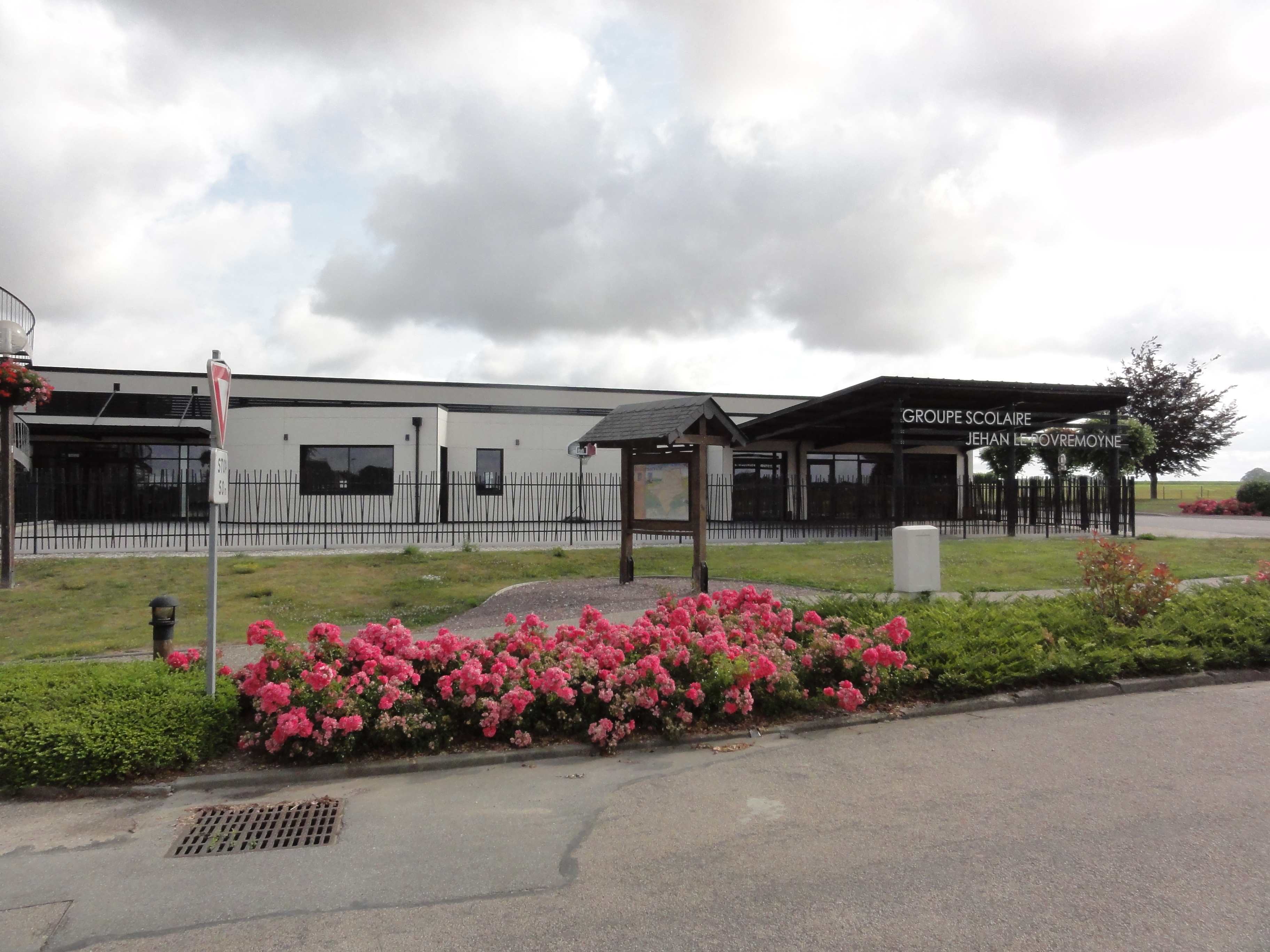 Valliquerville (Seine-Mar.) groupe scolaire Jehan Le Povremoyne